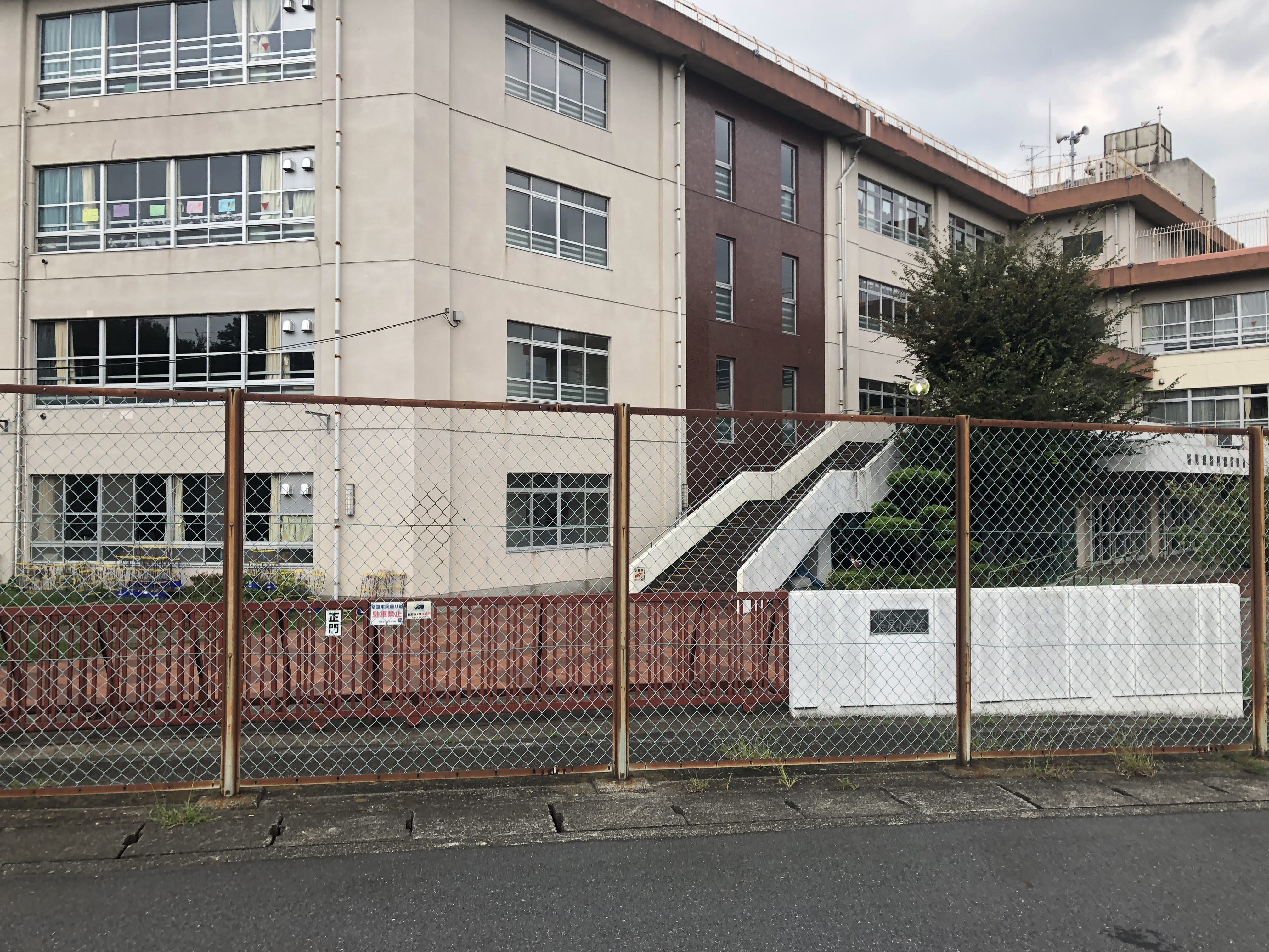 川崎市立長尾小学校